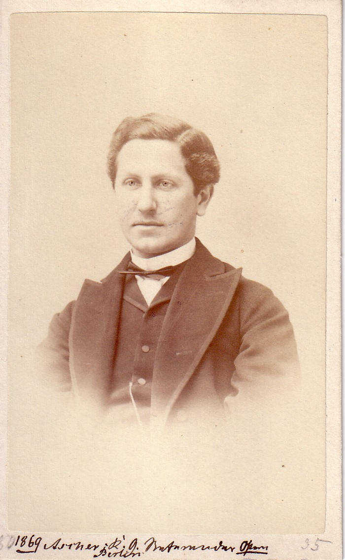 Hermann Ascher als Referendar